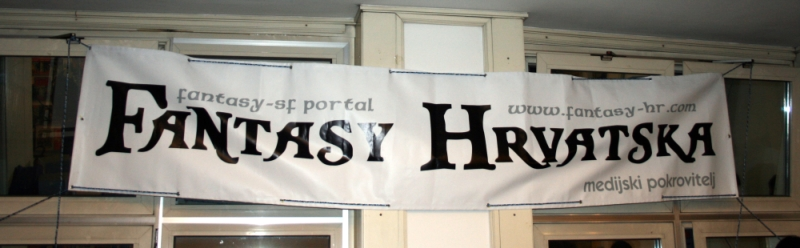 SFeraKon, Zagreb